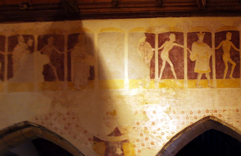 Chapelle Kermaria an Iskuit, commune de Plouha, Côtes-d'Armor (22), France. Fresque de la Danse macabre